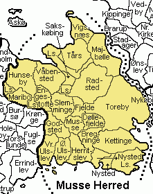 Musse Herred Maribo Amt , Denmark. Map by Svend-Erik Christiansen, edited by user:Nico-dk .